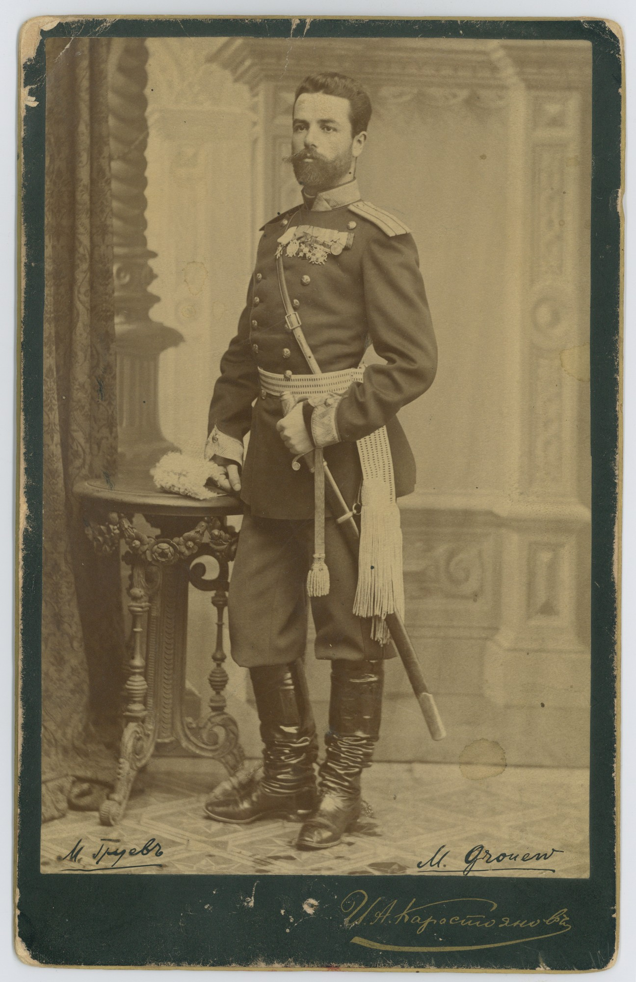 Портрет на Петър Груев като майор от българската восйска, направен от Иван Карастоянов в периода 1885/1886